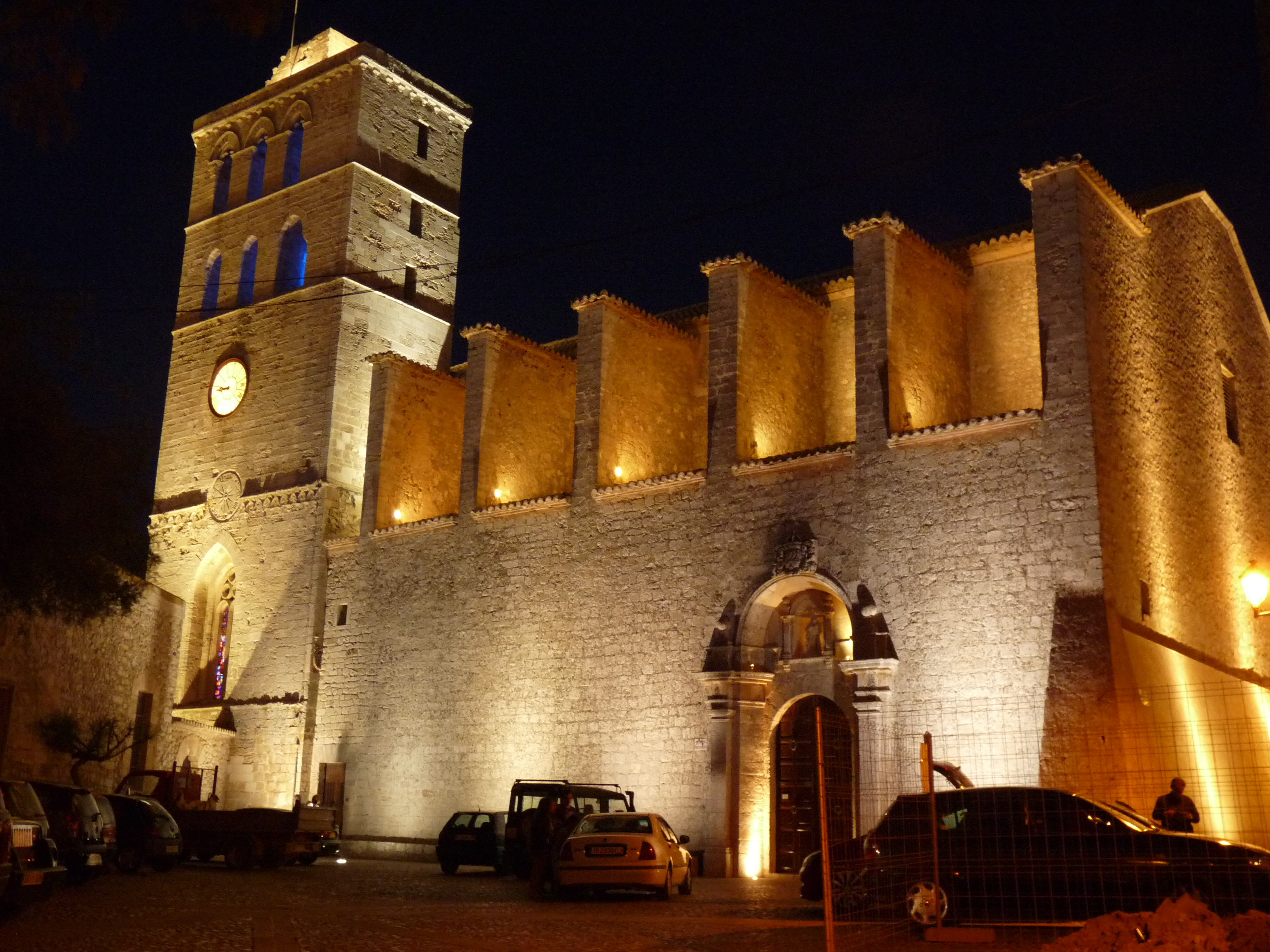 Eglésia Sant Pere, Dalt Vila, Ibiza